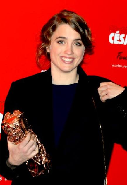 Adèle Haenel à la cérémonie des César